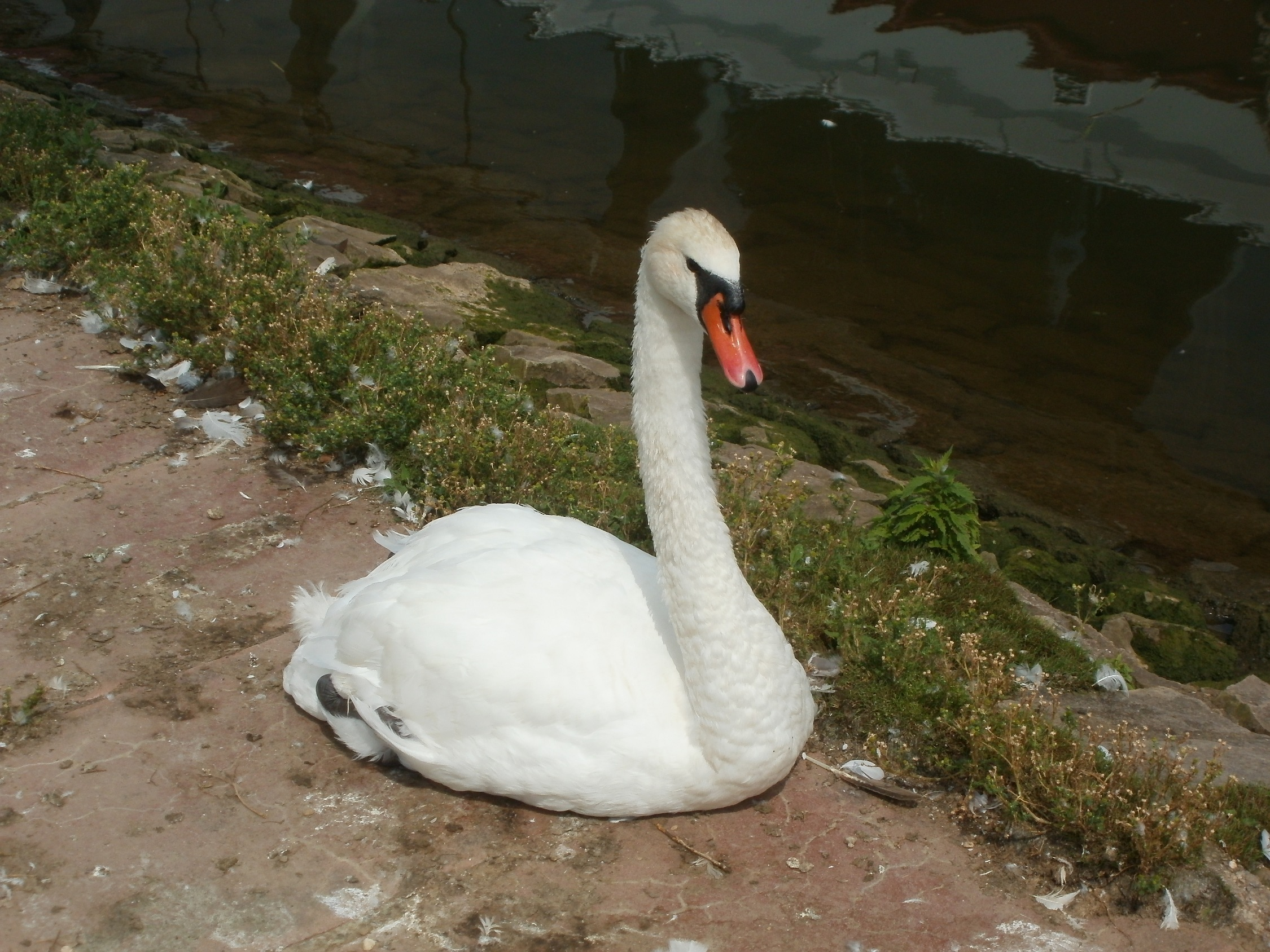 Schwan an der Mosel in Remich